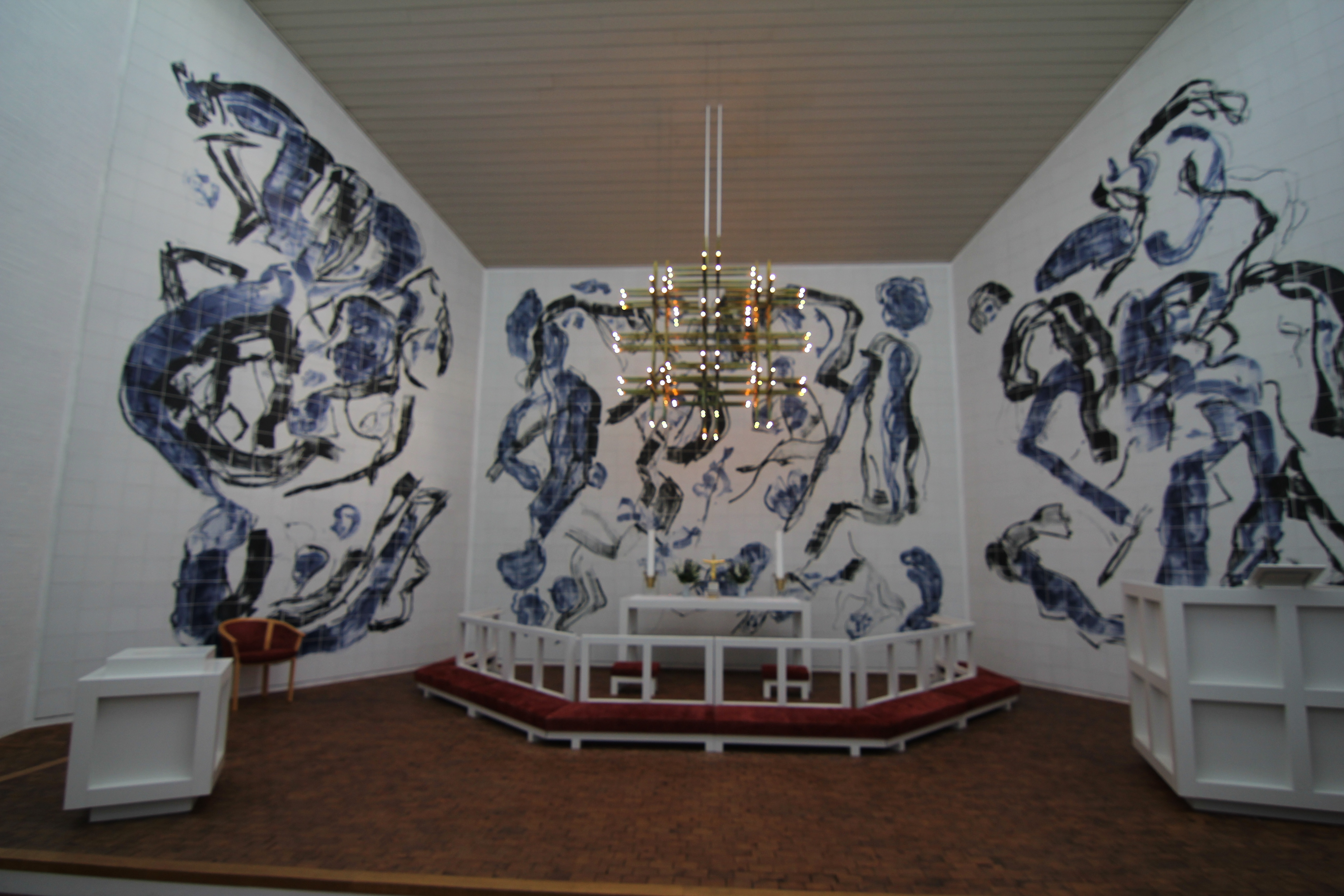 Sejs-Svejbæk Kirke i Silkeborg Kommune The wall decorations are by Mogens Andersen (1990).